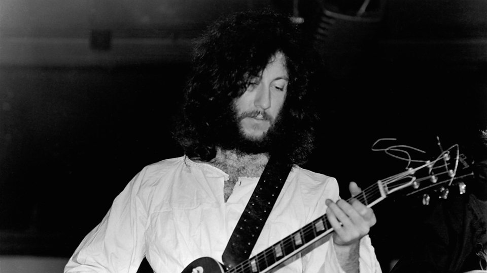 Peter Green, miembro fundador de Fleetwood Mac